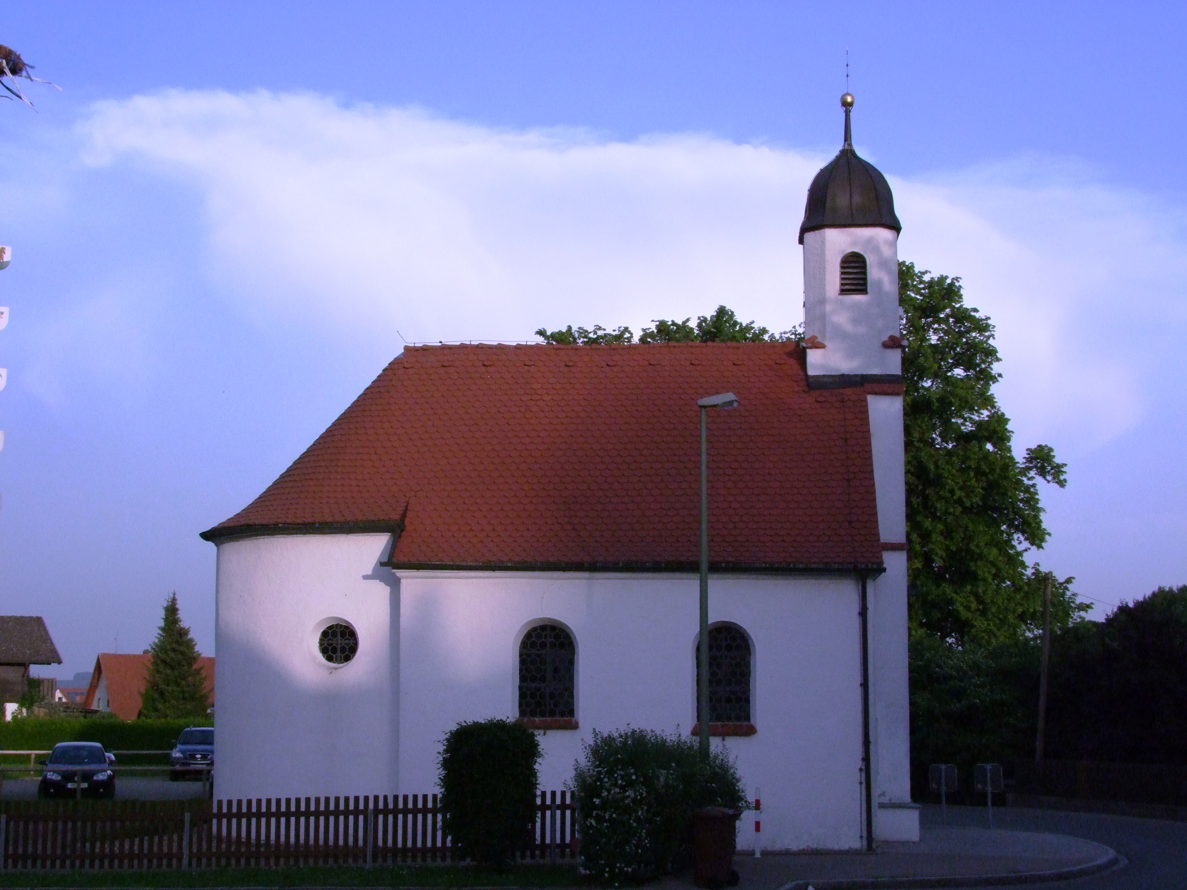 St. Nepomuk im oberschwäbischen Eisenburg, einem Stadtteil von Memmingen